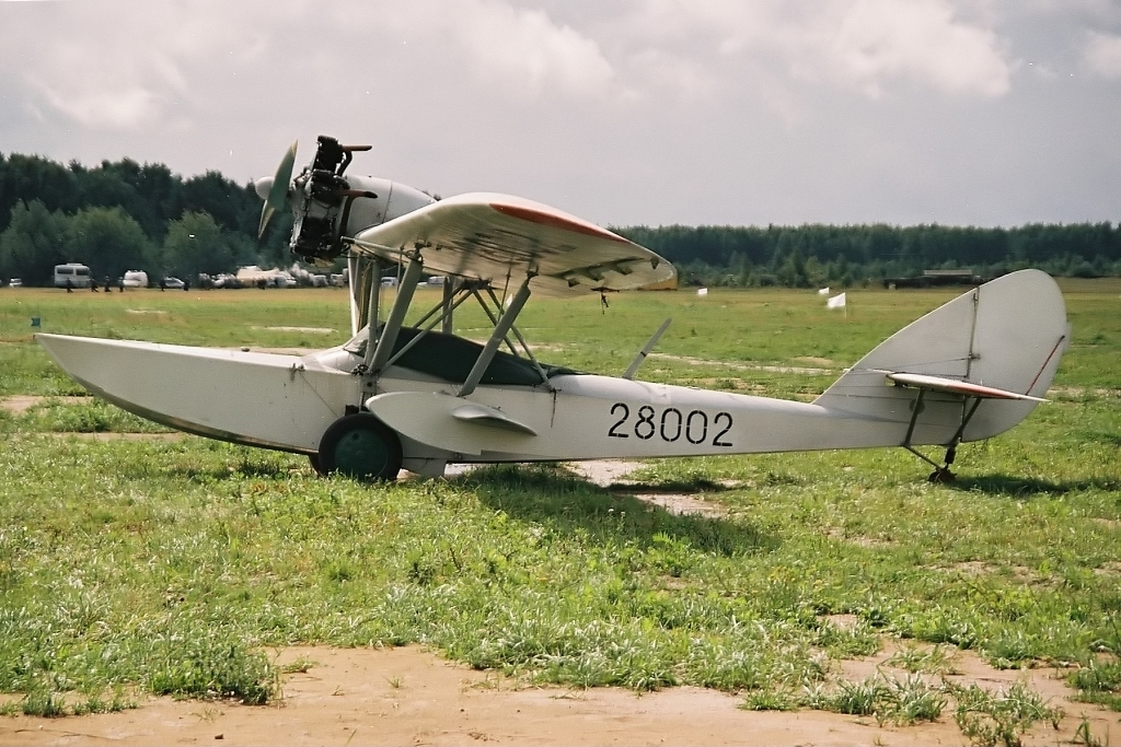 Shavrov Sh-2 (Monino)